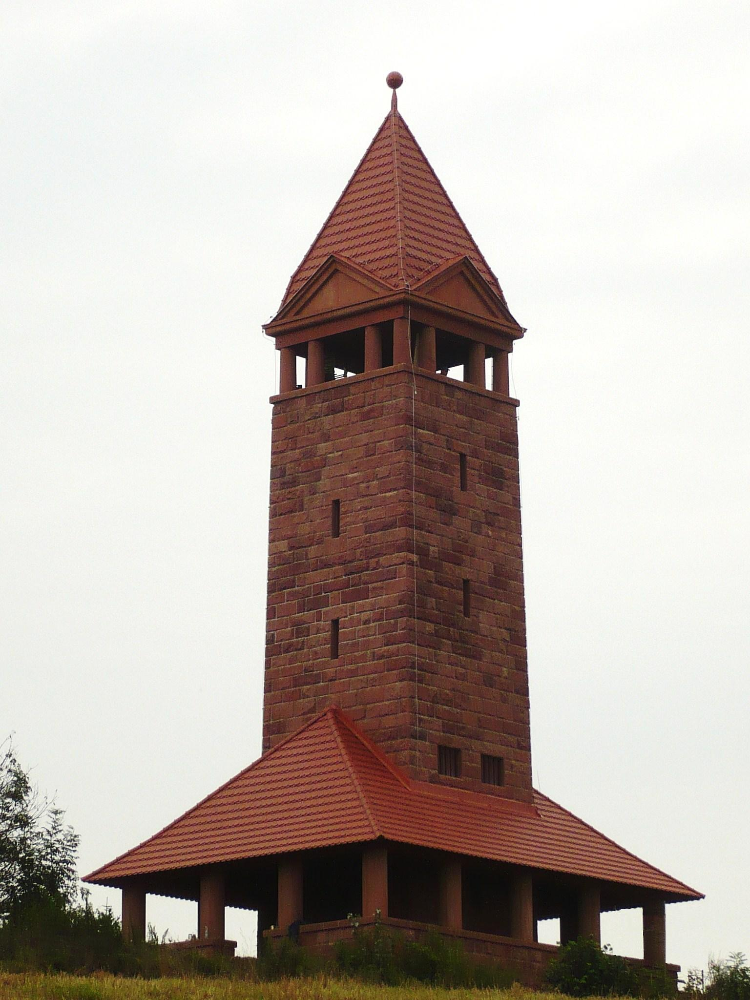 Wieża na Górze Anny w Nowej Rudzie po remoncie